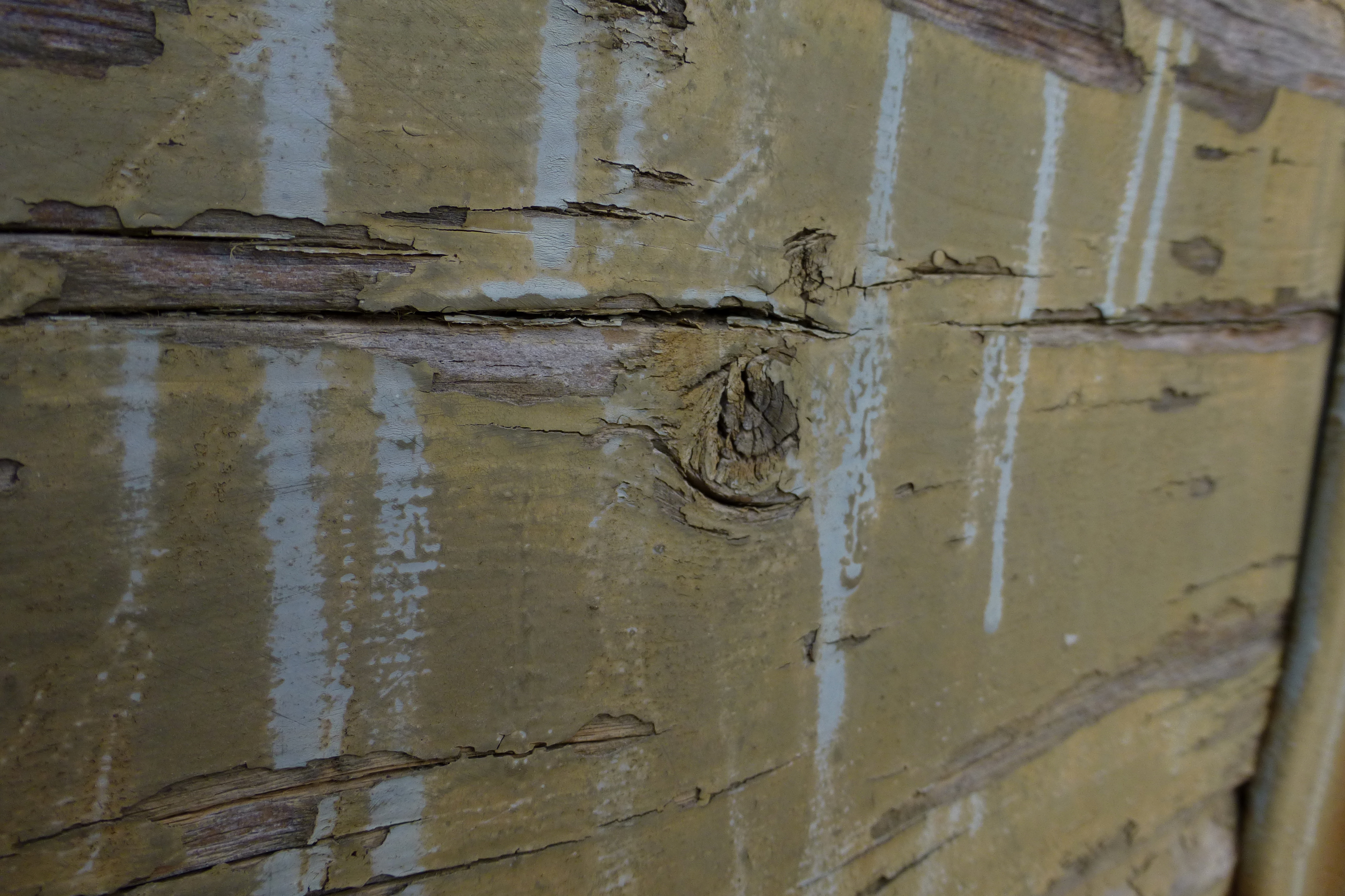 בית המסילאים תחנת רכבת יגור